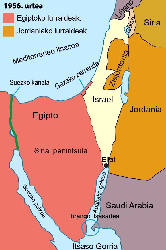 Suezko Gerraren ondorioak